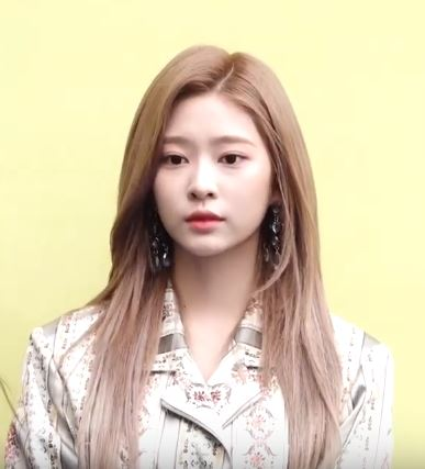 '아이즈원' 김민주, 강혜원, 이채연과 미야와키 사쿠라가 16일 오후 서울 중구 을지로 동대문디자인플라자(DDP)에서 열린 ‘빅팍 서울 패션위크 S/S 2020 컬렉션’에 참석했다.